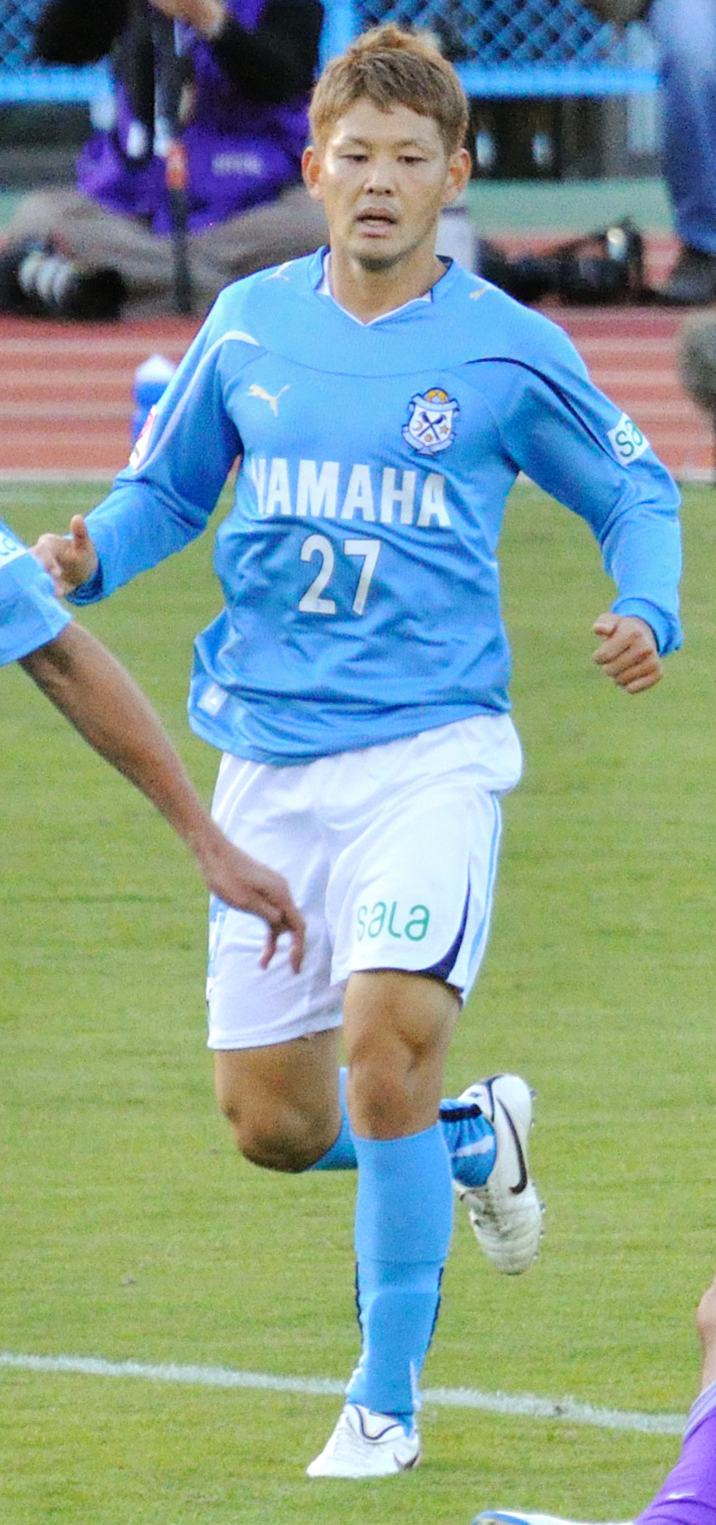 Kota Ueda DSC_7721